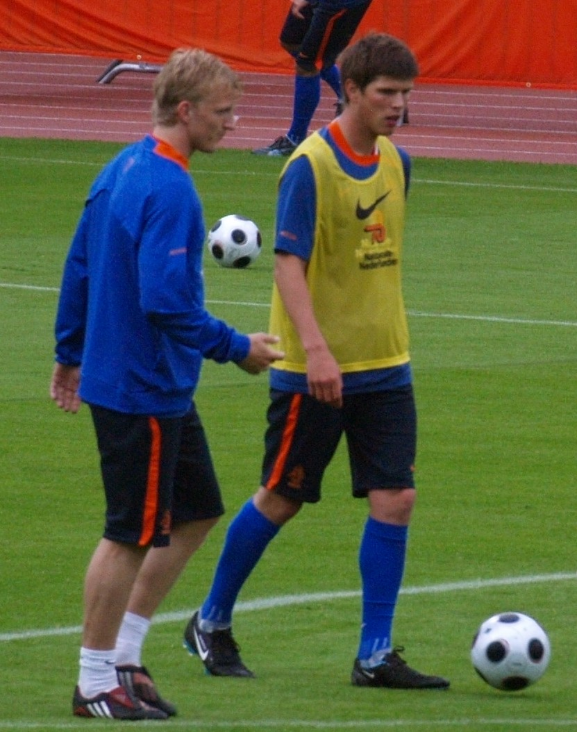 Klaas-Jan Huntelaar and Dirk Kuyt